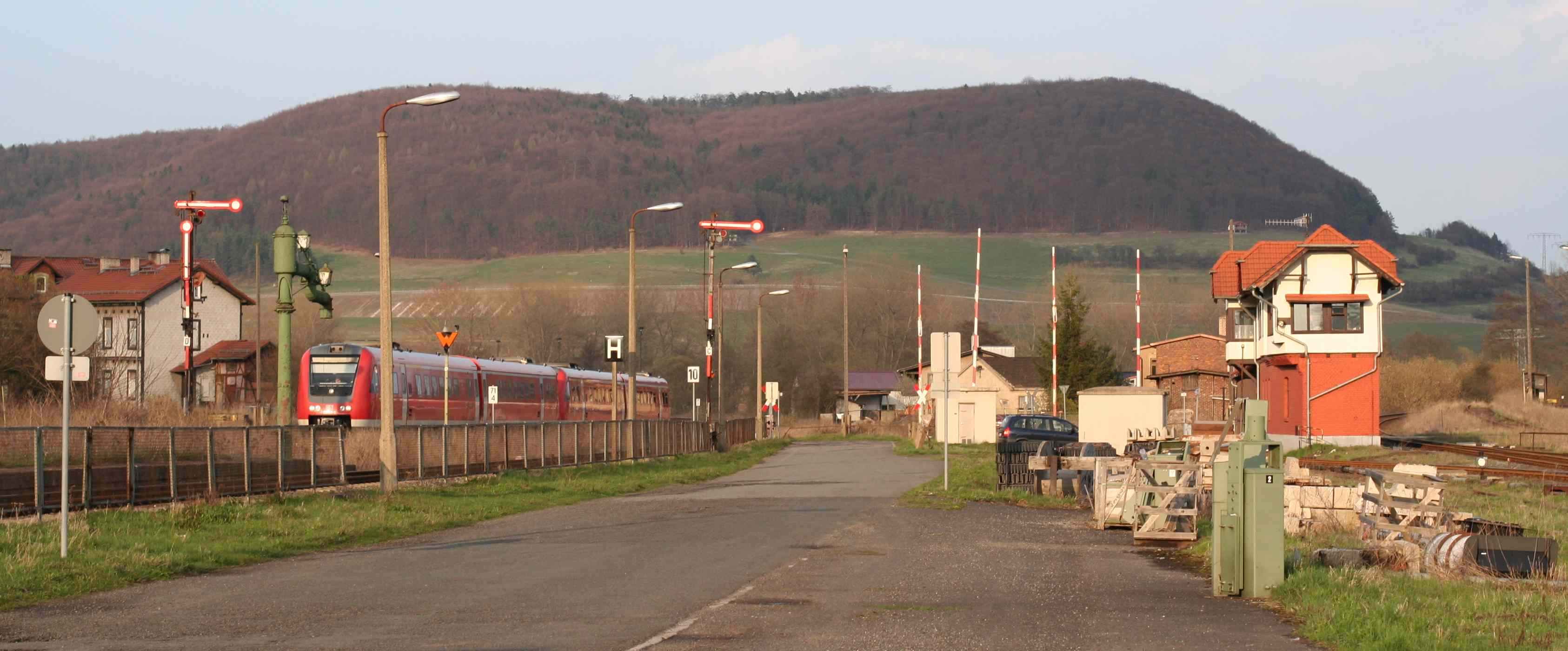 Grimmenthal Ostseite , Railway station (Einfahrender RE aus Suhl)